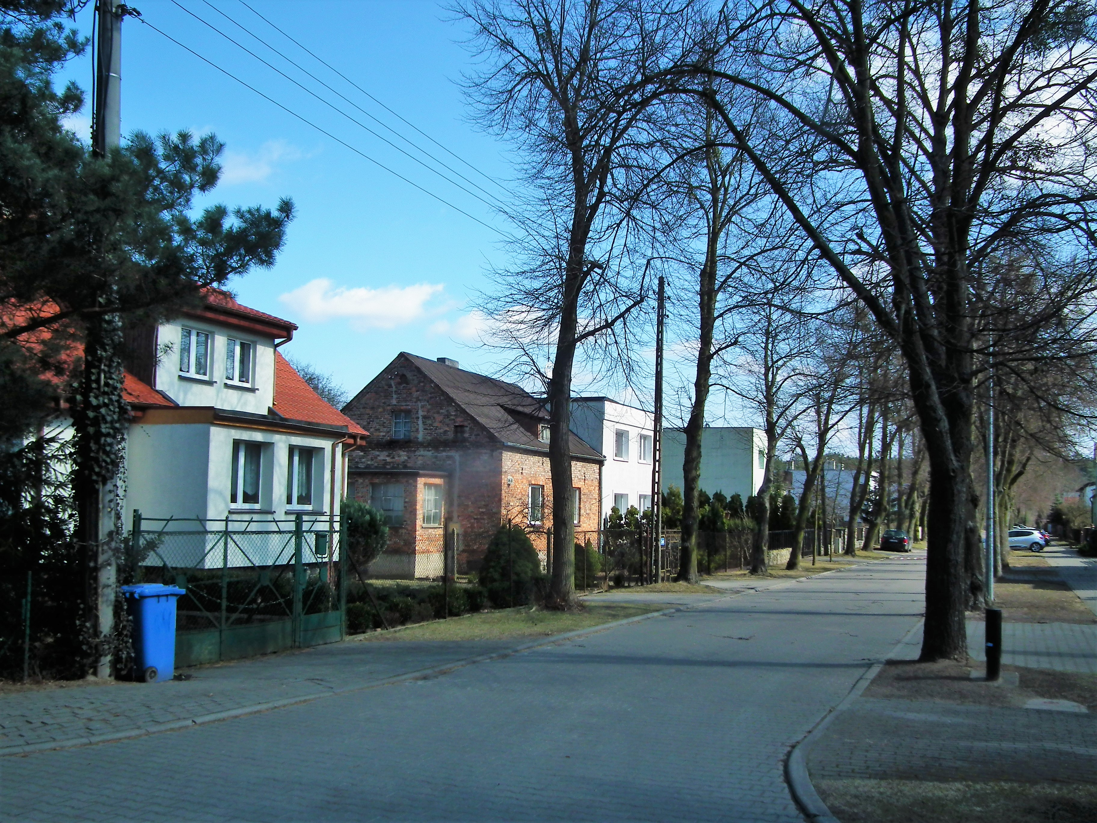 Poznań, ul. Dzieci Wrzesińskich na Kobylepolu.